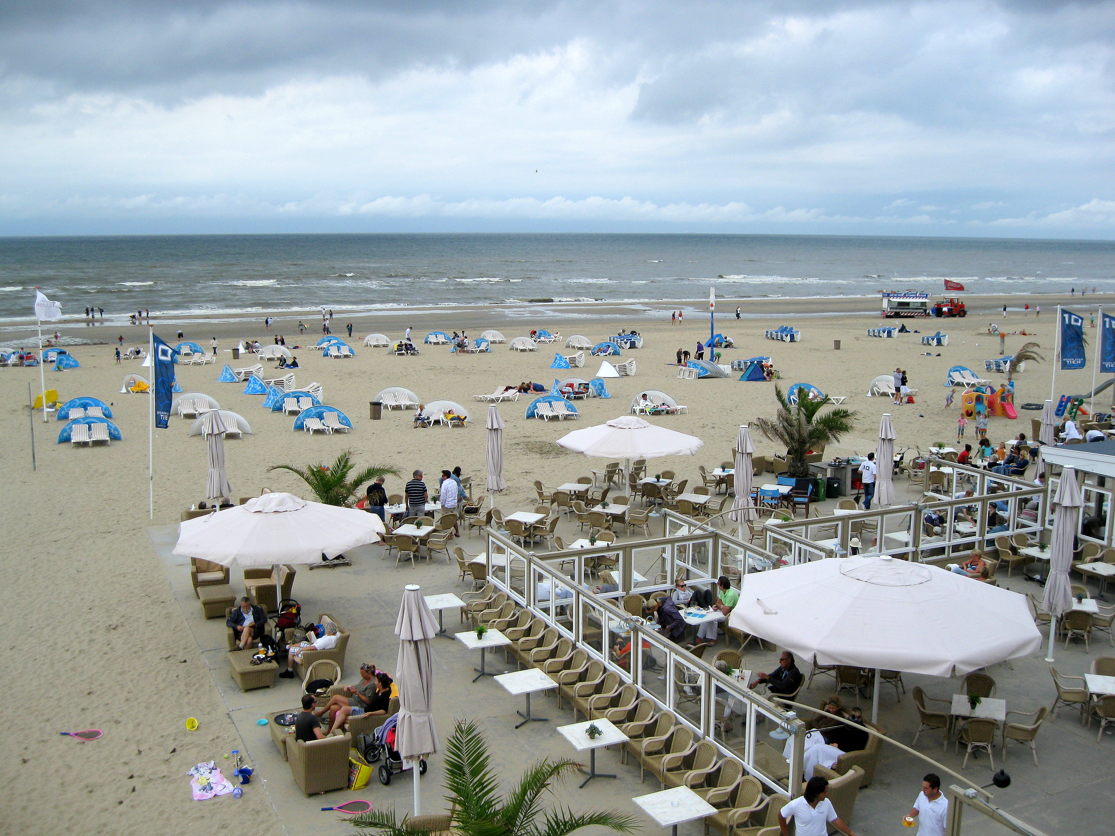 Zicht op een deel van een standpaviljoen in Zandvoort.